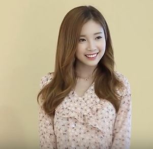 [TV텐] 에이프릴(April) 인터뷰 메이킹 영상